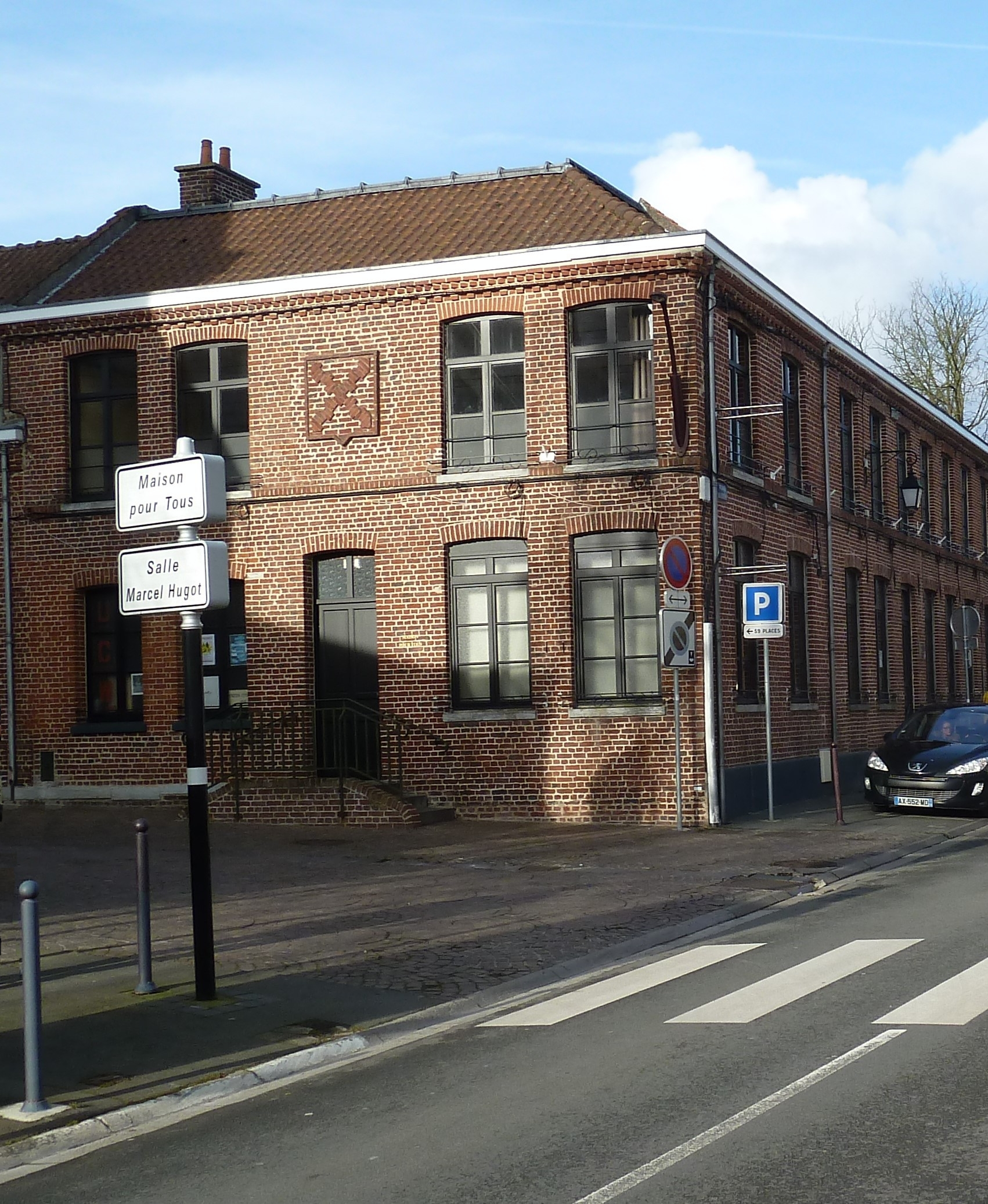 Salle Marcel Hugot, sur la façade en briques sont représentées les armes de la ville ainsi blasonnées: « D'or au sautoir bretessé et contre-bretessé de sable. » Wattignies, Nord, Nord-Pas-de-Calais-Picardie France.